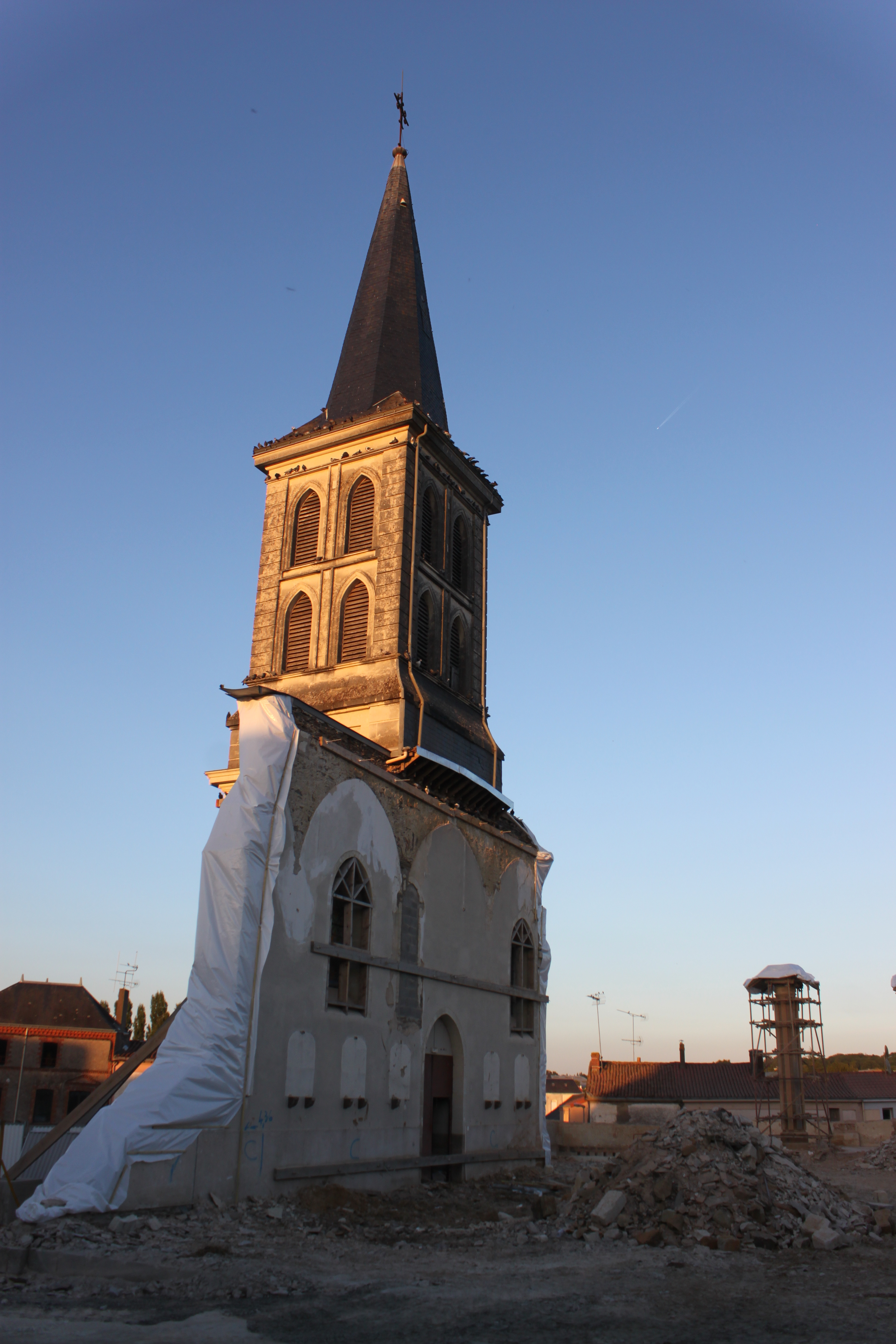 Église Saint-Pierre-aux-Liens, en cours de destruction, Fr-49-Gesté.